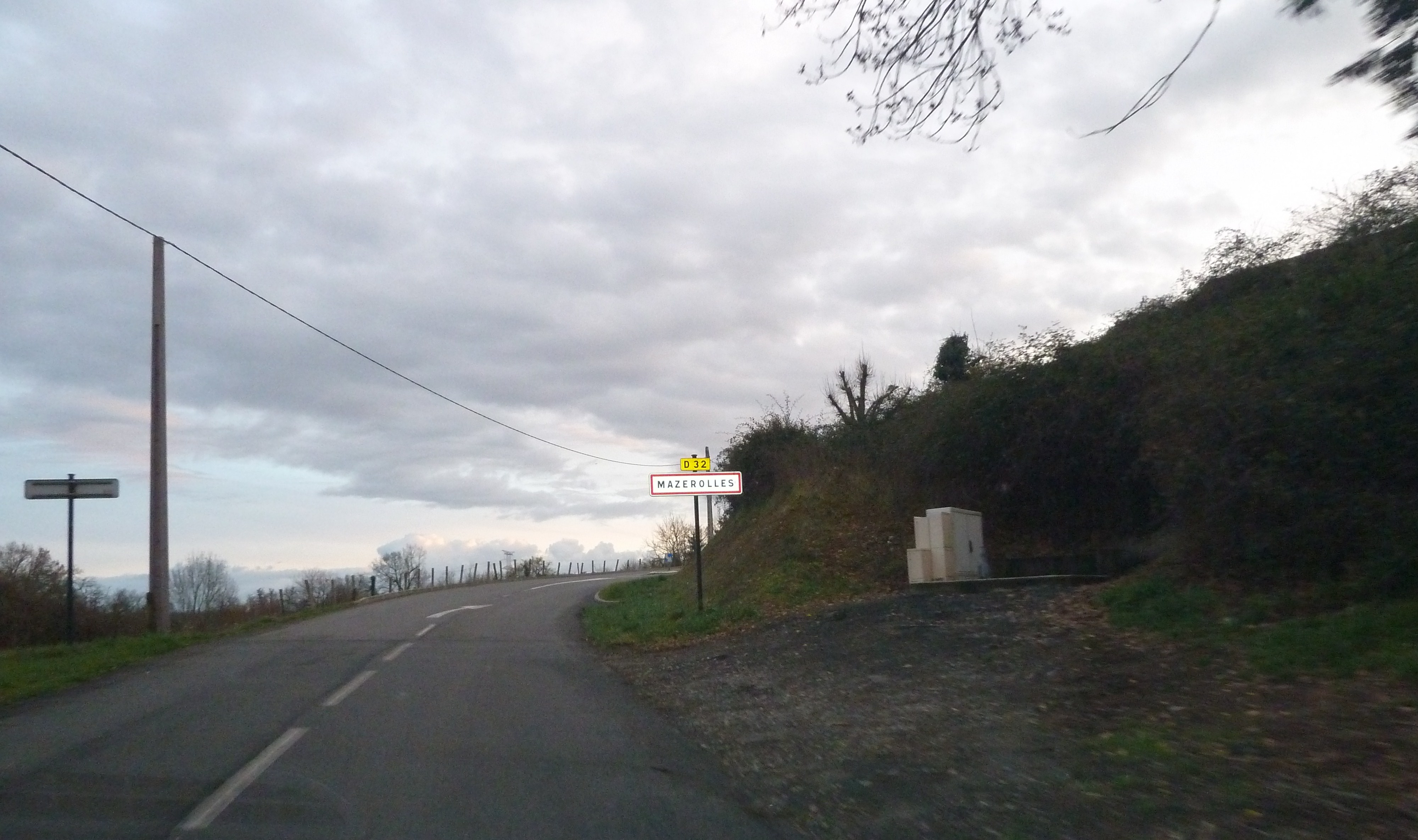 Entrée dans Mazerolles (Pyrénées-Atlantiques)